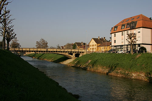 Payerne: La Broye